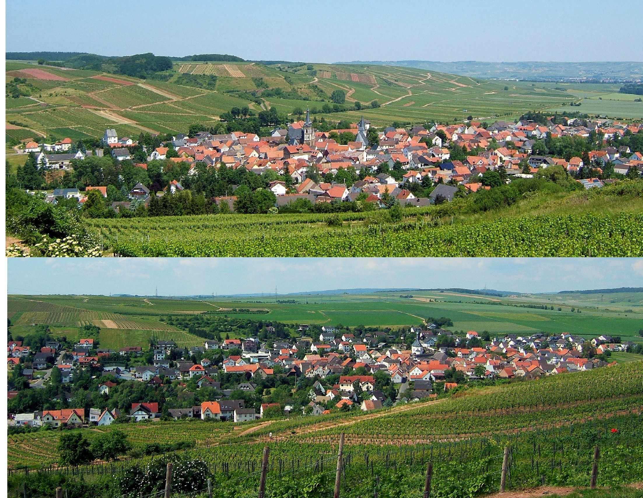 GULDENTAL - Die Ortsteile Heddesheim/oben + Waldhilbersheim/unten